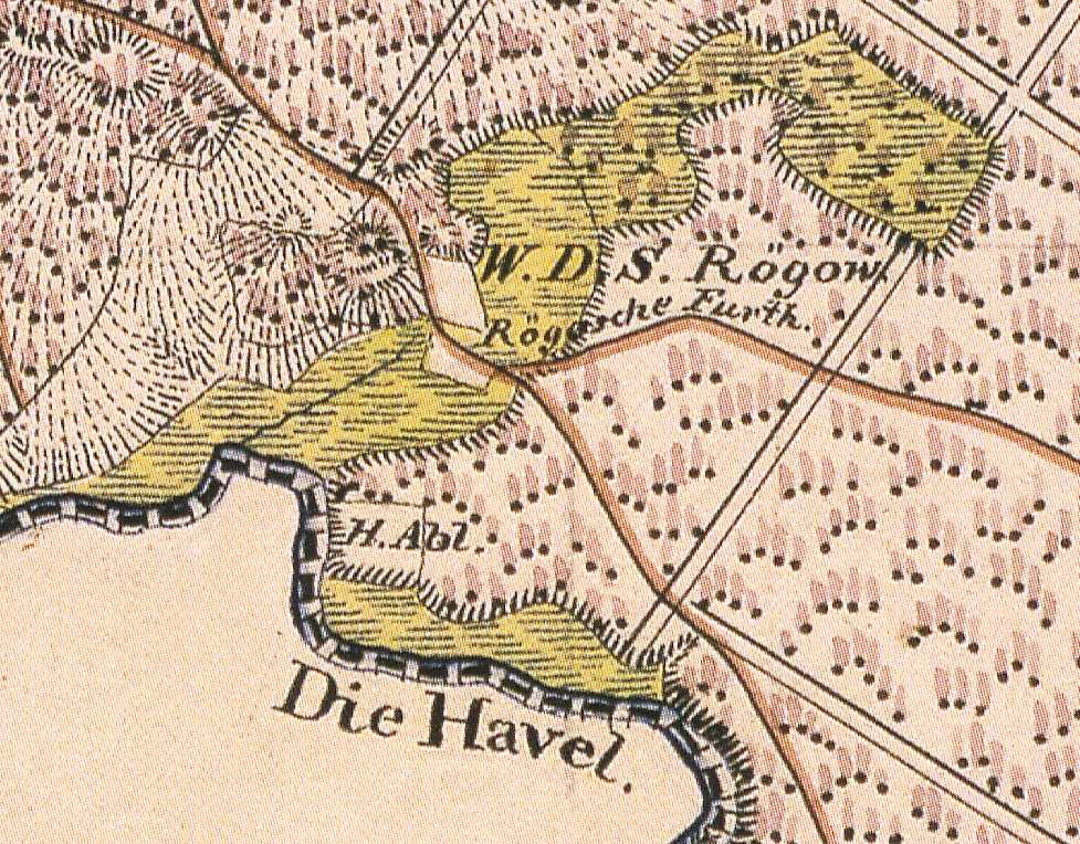 Rudow, wüste Dorfstätte, nahe Lychen, Lkr. Uckermark, Brandenburg, Ausschnitt aus dem Urmesstischblatt Blatt 2745 Lychen von 1825